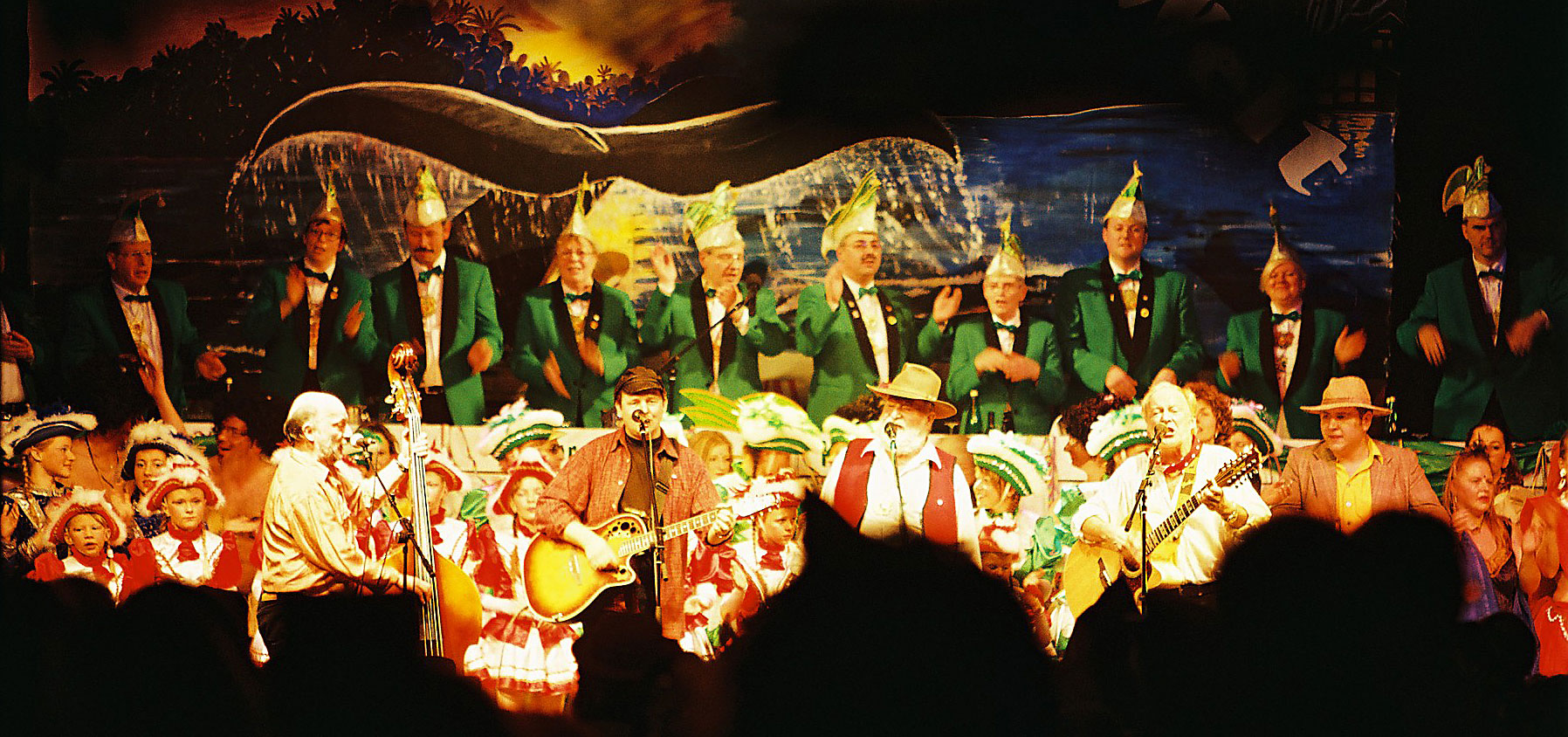 Karnevalsveranstaltung am 10. 2. 2007 in Eberswalde zu den Eberswalder Faschingstagen